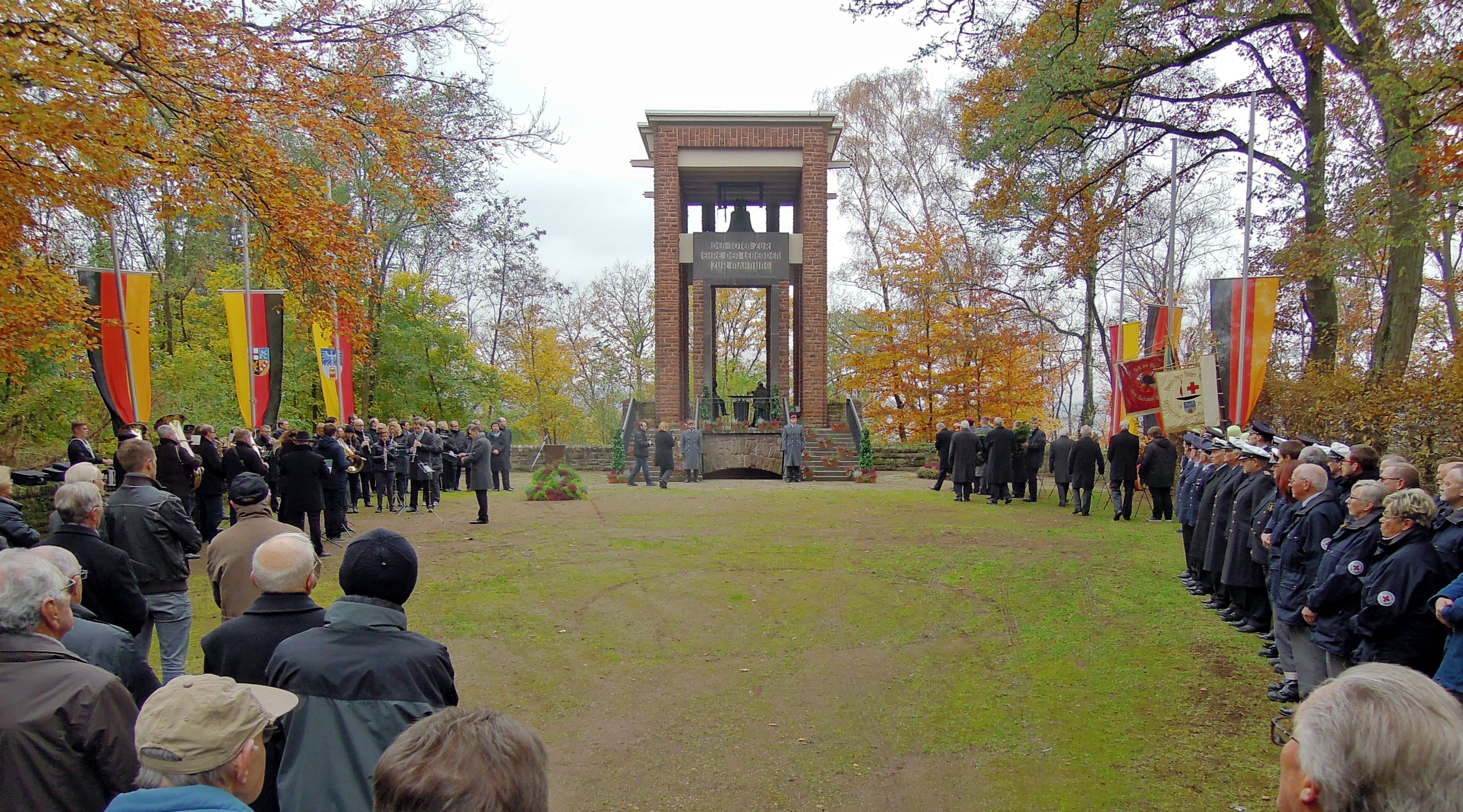 Volkstrauertag 2013 am Ehrenmal